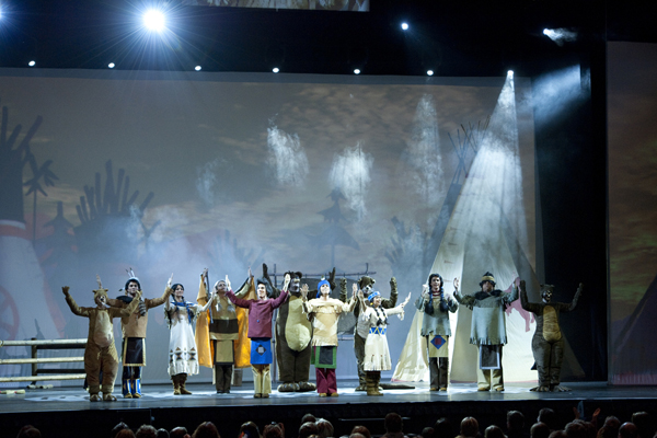 Szenenfoto Yakari Musical